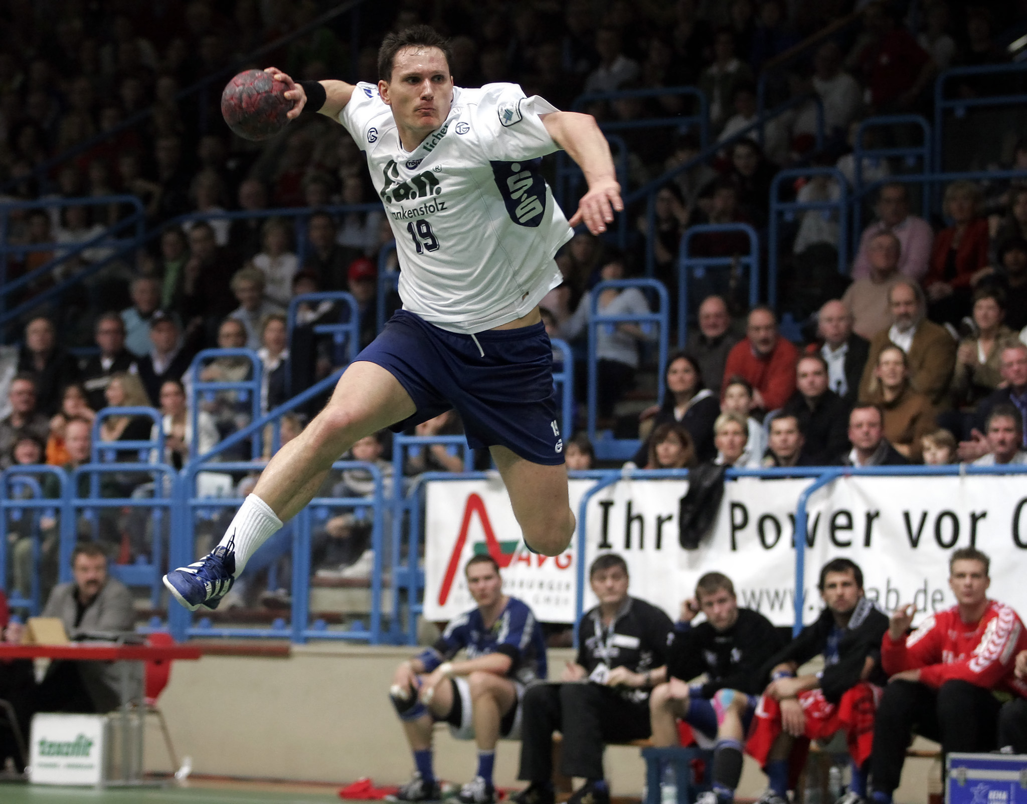 Andreas Kunz, Spieler des TV Großwallstadt, am 24. März 2007 im Spiel gegen den TBV Lemgo in der Aschaffenburger Unterfrankenhalle